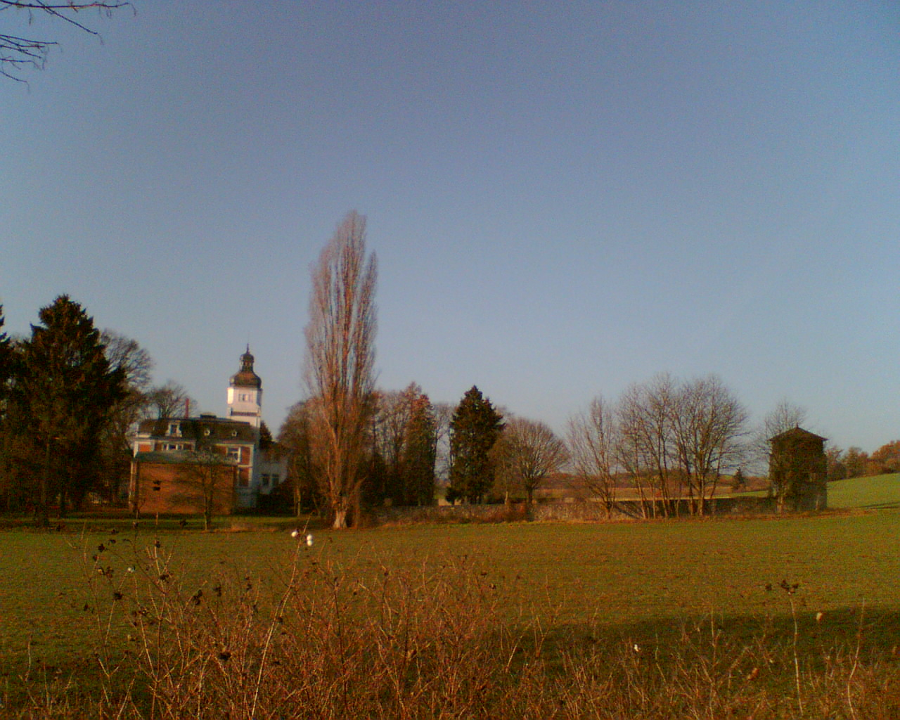 Gebäude Juliusmühle mit historischer Begrenzungsanlage